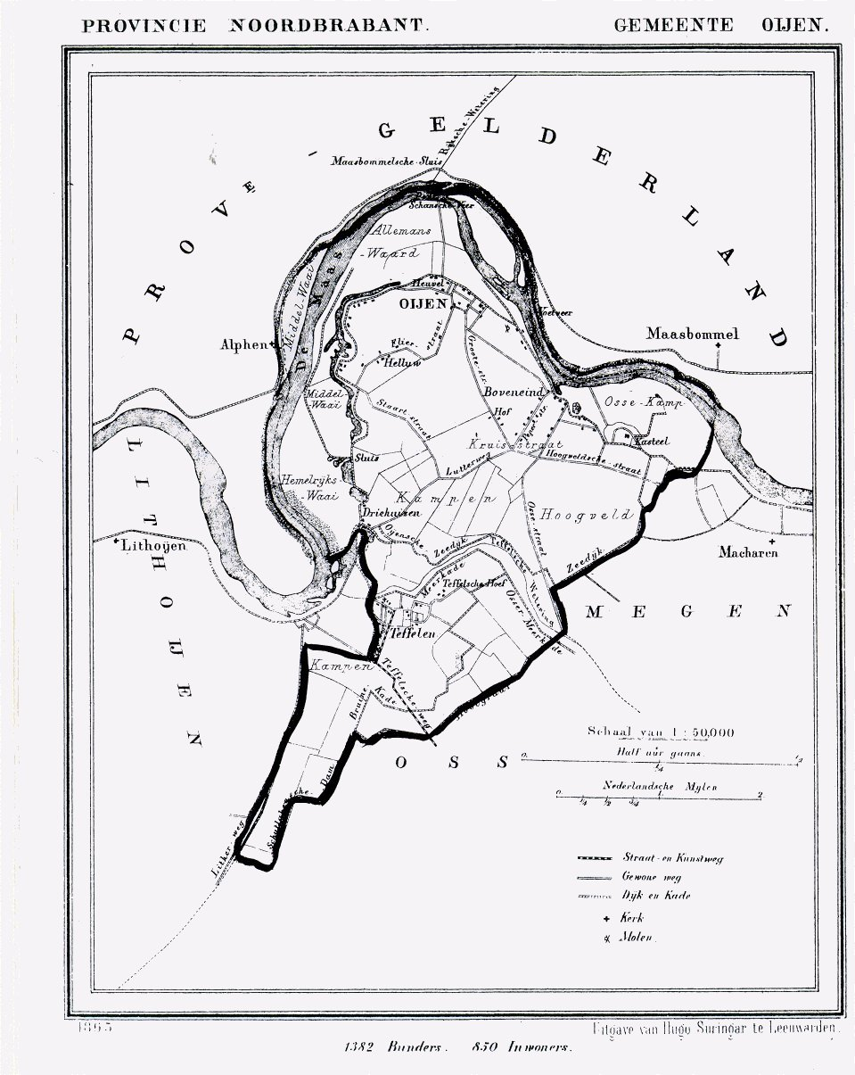 Kaart van Oijen en Teeffelen uit Gemeente Atlas van Nederland, J. Kuyper 1865-1870, Uitgave Hugo Suringar Leeuwarden.